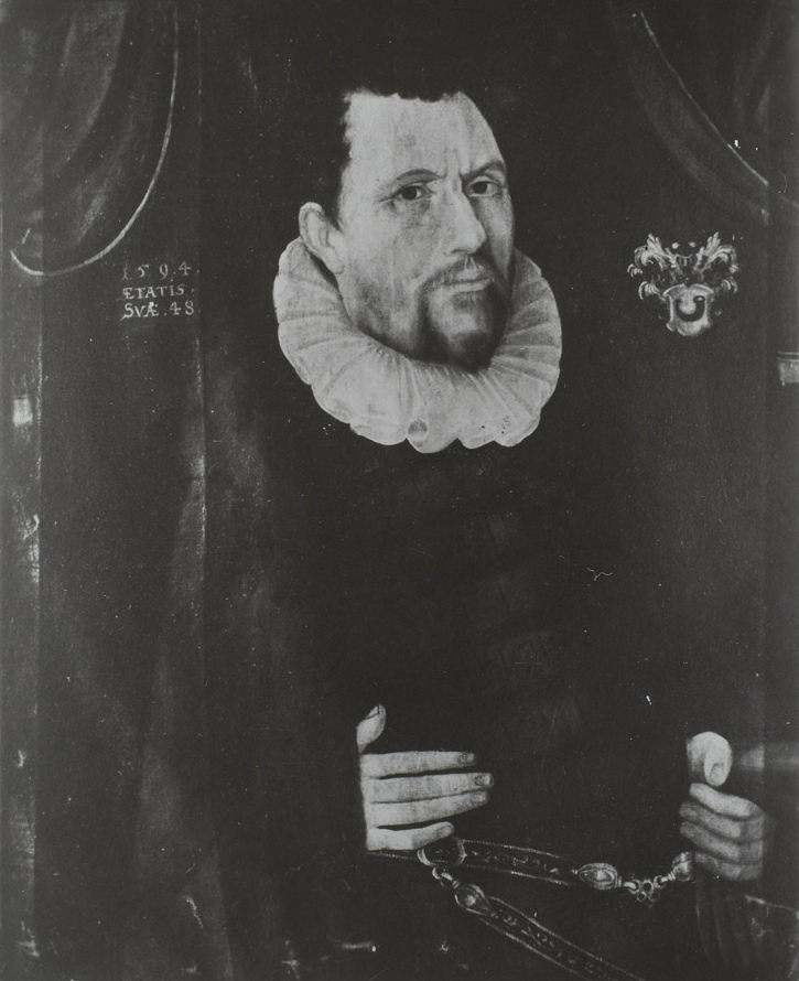 Henrik Karlsson Horn (u. 1550-1601)